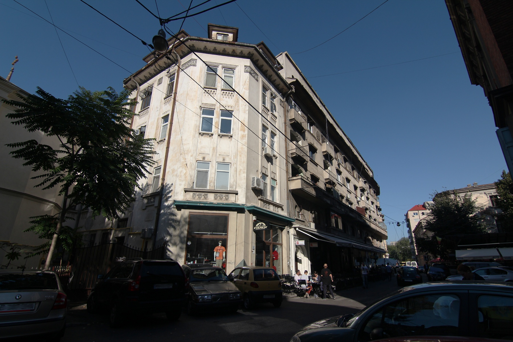 Casă pe Blănari